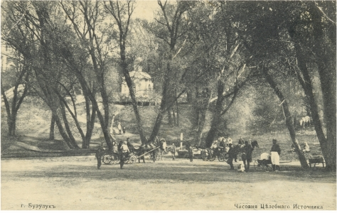 Российская империя. Бузулук. Спасо-Преображенский монастырь. Часовня у целебного источника